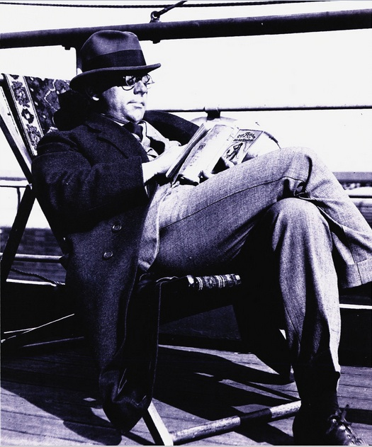 Augustin Paus, overingeniør og utbyggingsleder for Rånåsfoss kraftverk, senere adm.dir. for Akershus elektrisitetsverk (=Akershus Energi)